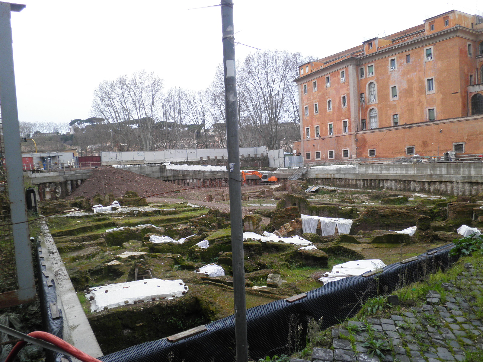 Roma, stato degli scavi a Lungotevere dei Tebaldi (Scuderie di Augusto) a gennaio 2014